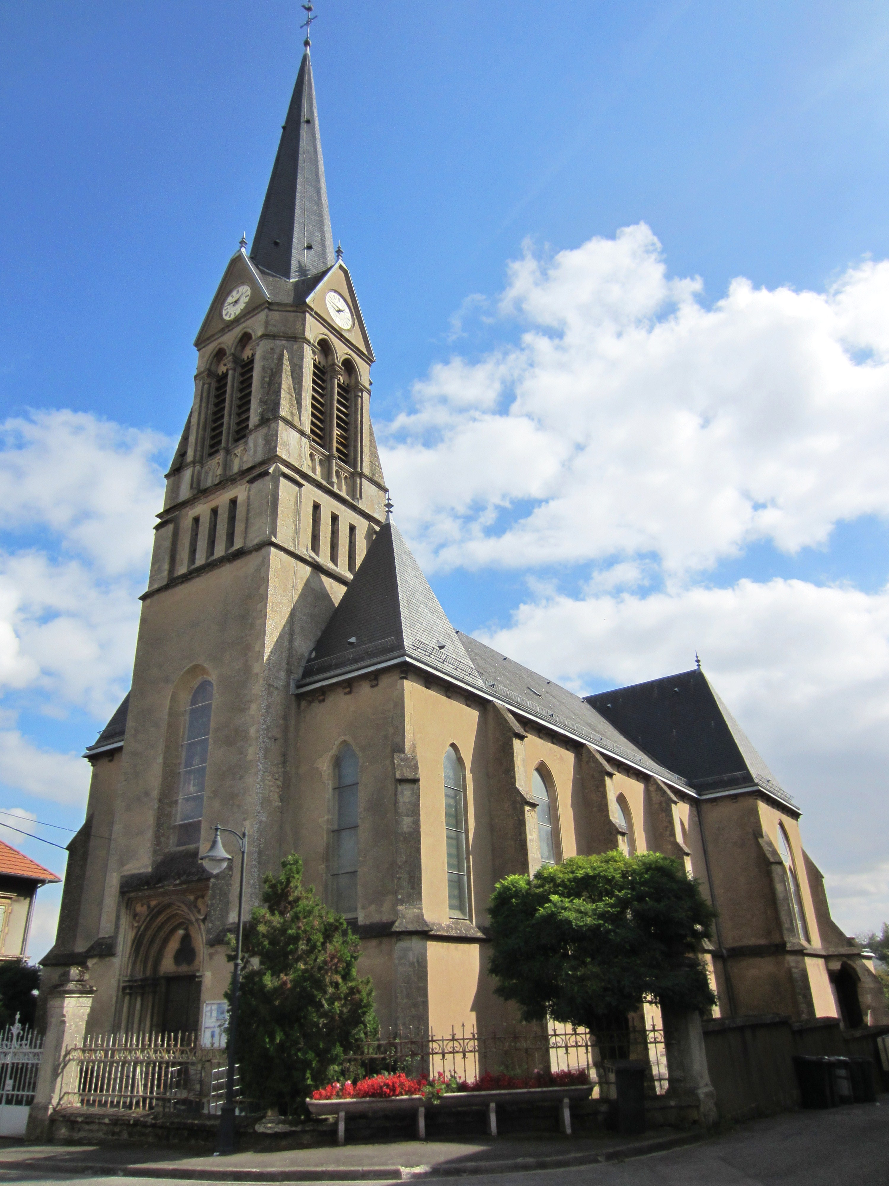 Description eglise Rédange Date23 September 2011Sourcemon appareil photoAuthorAimelaimePermission(Reusing this file) eglise Rédange